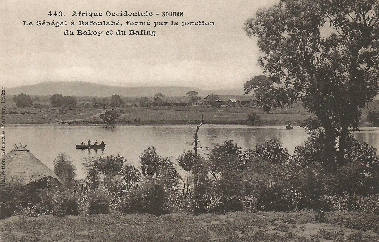 François-Edmond Fortier, Le Sénégal à Bafoulabé, formé par la jonction du Bakoy et du Bafing. Afrique Occidentale - Soudan.